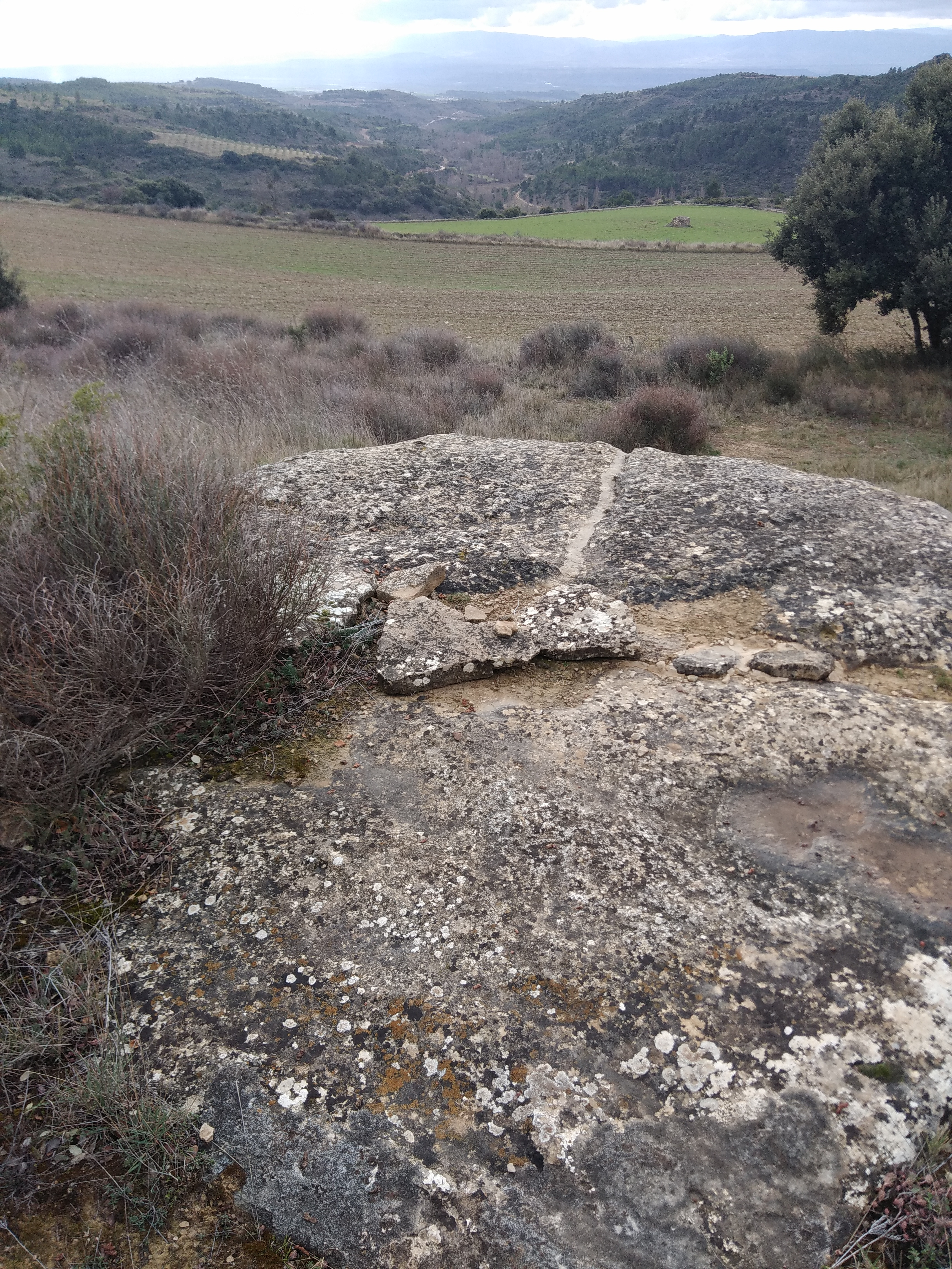 Hipogeo de Longar, cubierta de losas. Viana, Navarra, España